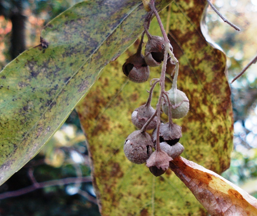 Styrax dasyanthus - fruits